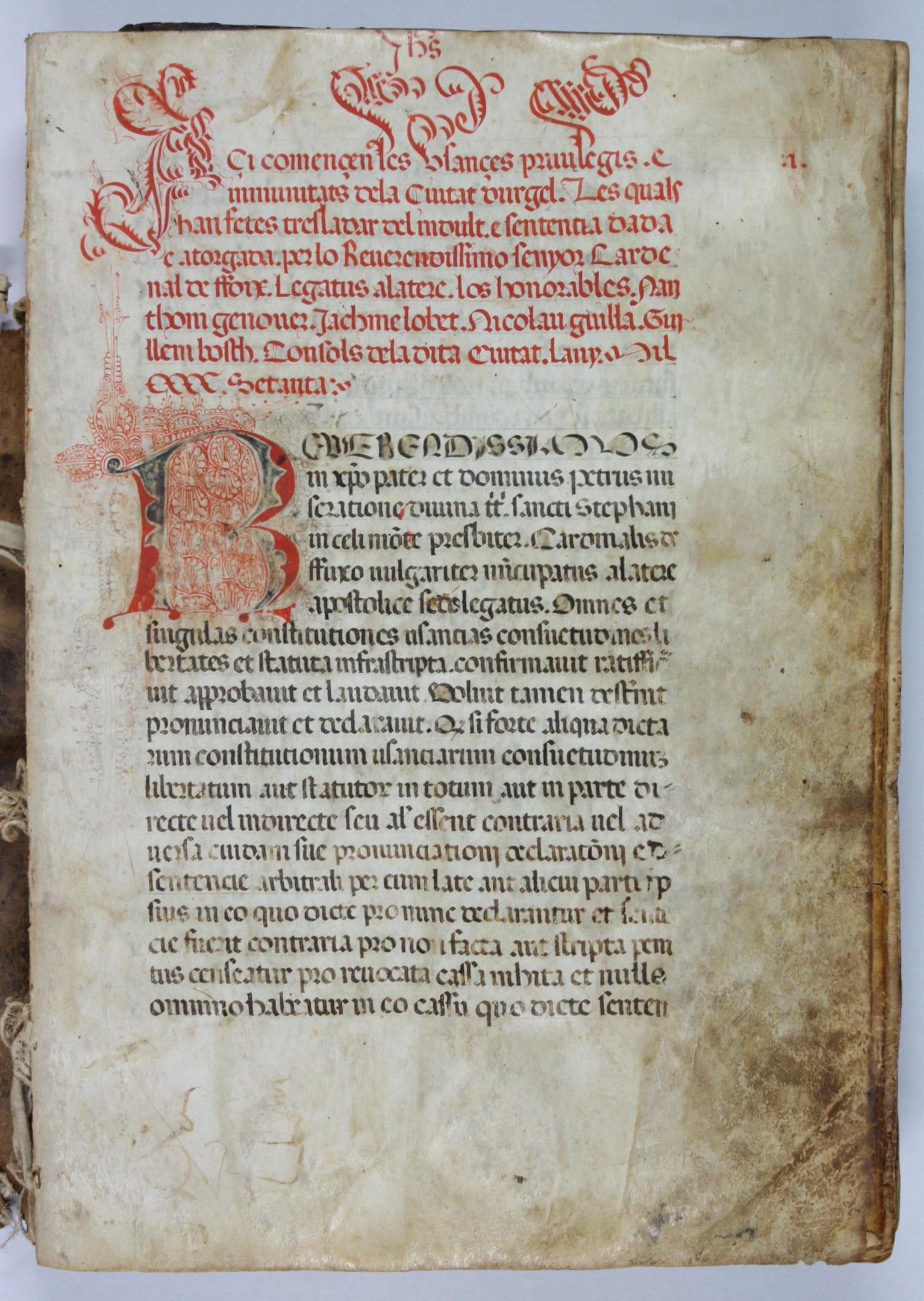 Dades tècniques Títol: Llibre de les Usances, Privilegis i Immunitats de la Ciutat d'Urgell Data: 1470 Suport material: Pergamí. Cobertes de fusta folrades de cuïr amb ornaments de bronze. Mides: 305x205 mm